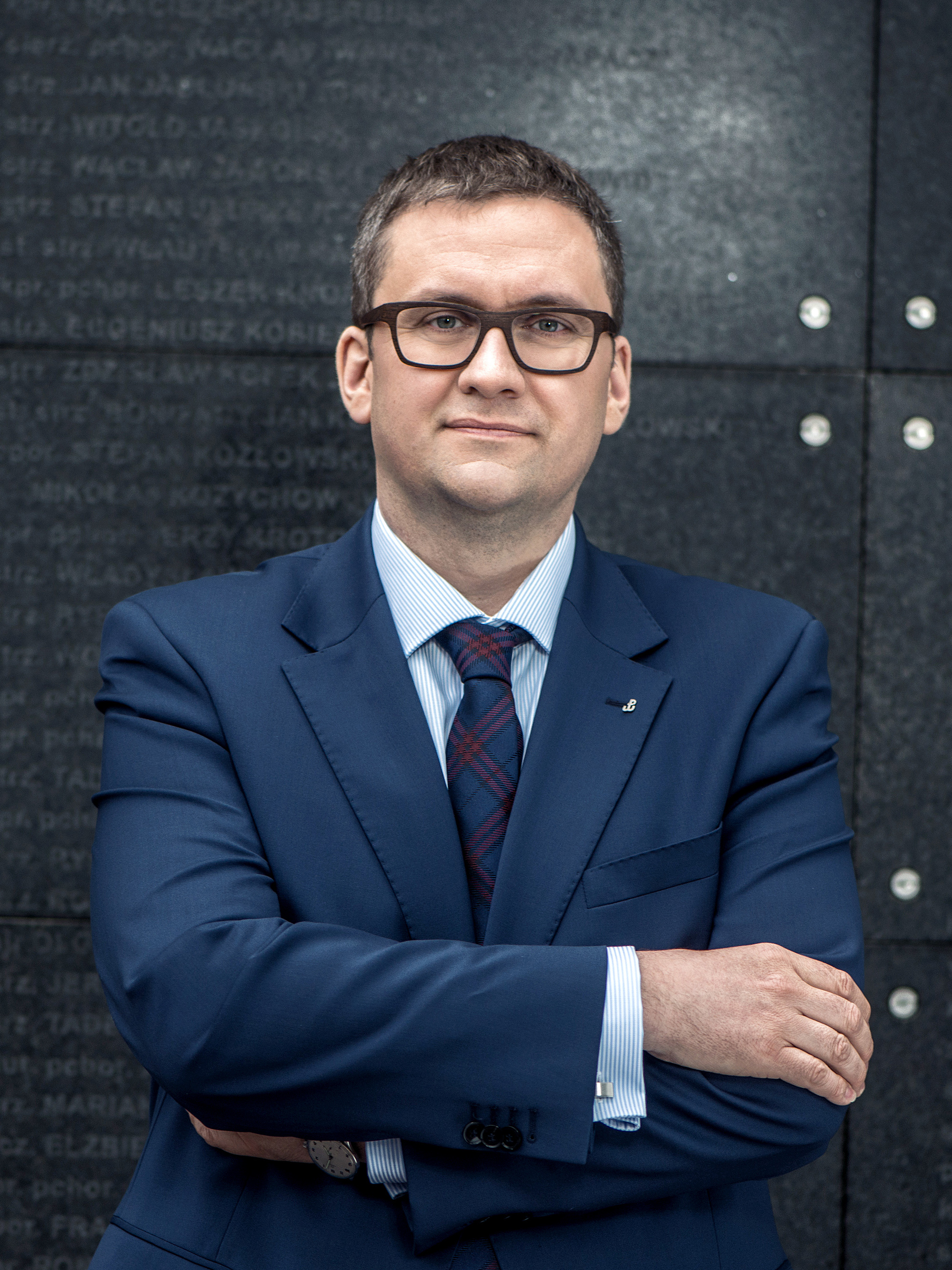 Jan Ołdakowski - Dyrektor Muzeum Powstania Warszawskiego